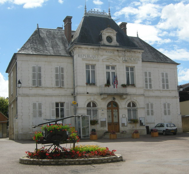 Mairie de Chichée, France